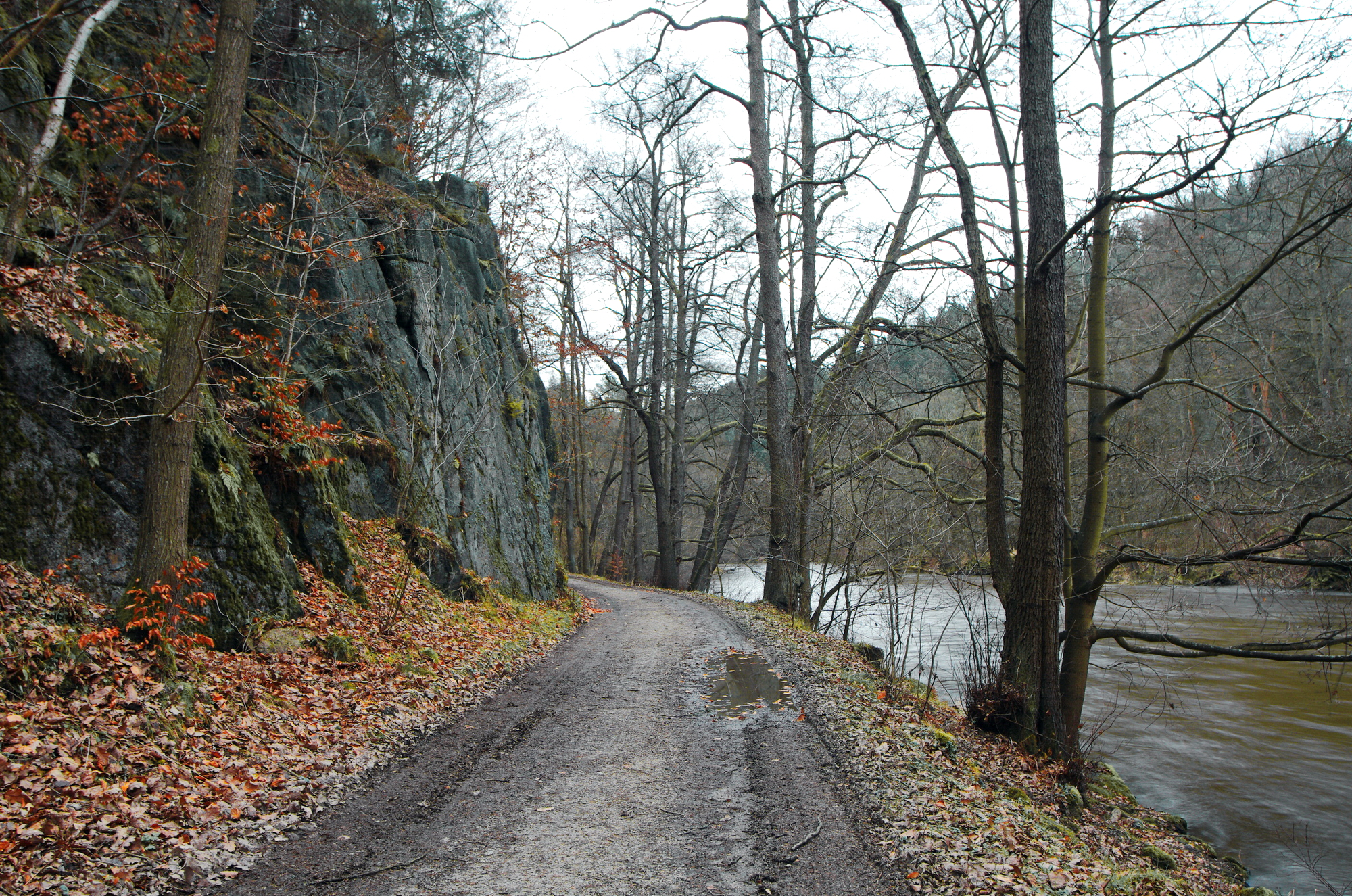 Evropsky významná lokalota Kaňon Ohře, v místě pod samotou Vildenava